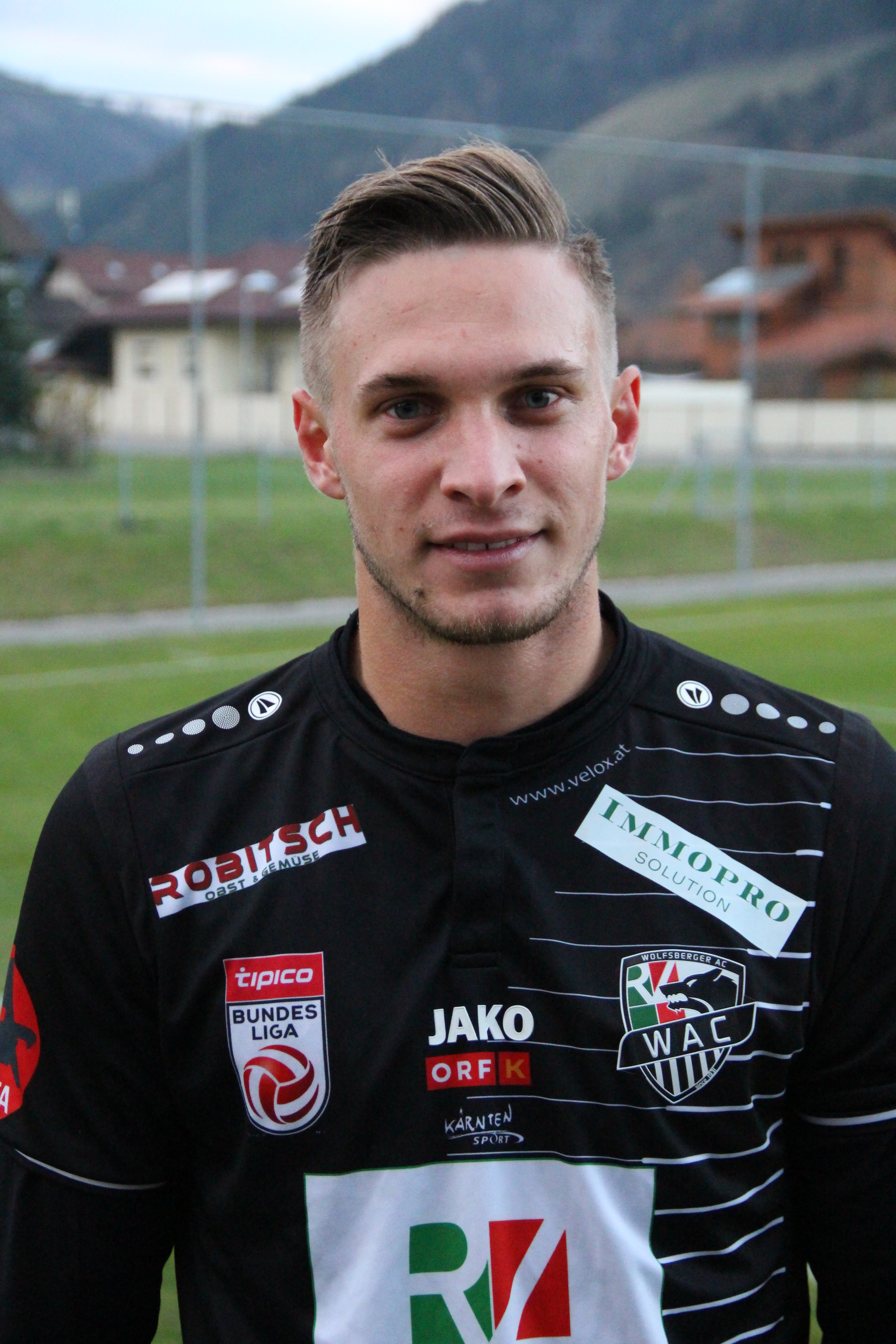 Bernd Gschweidl (WAC)